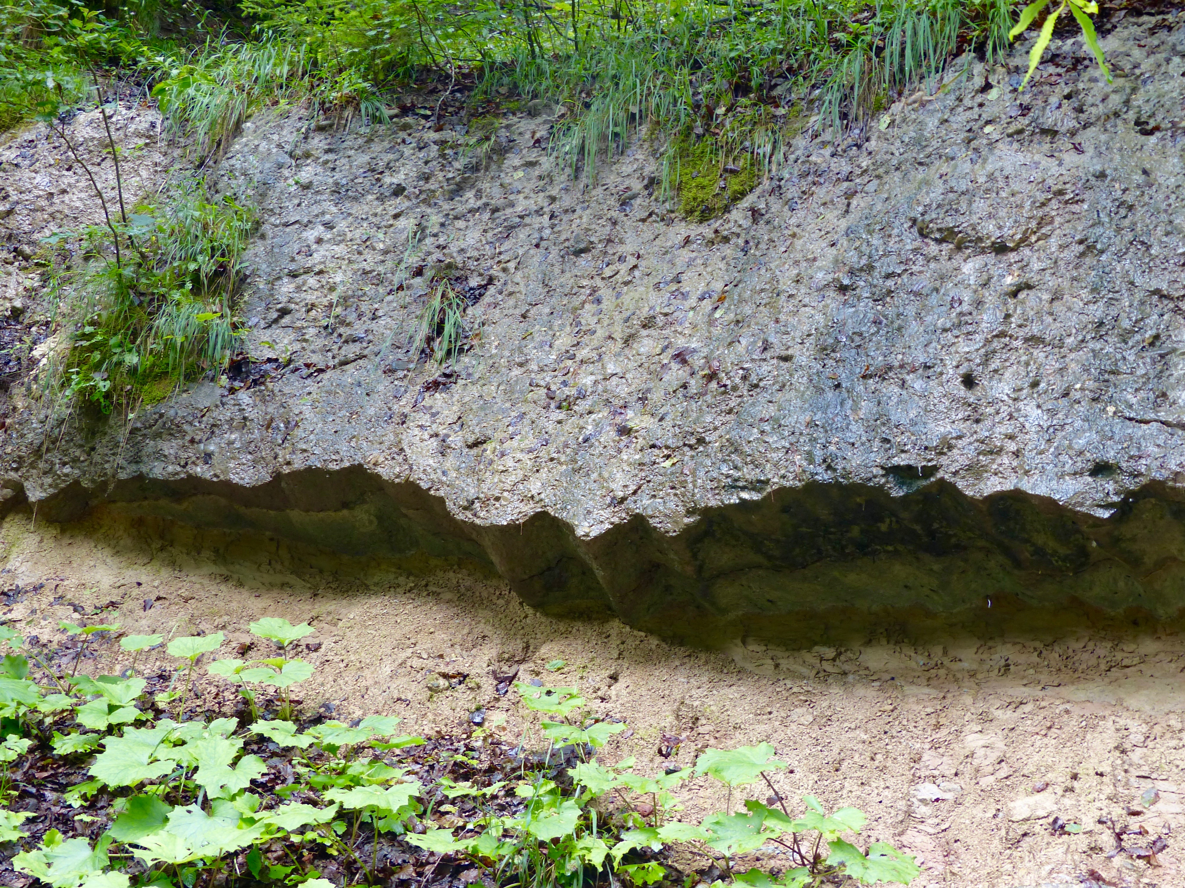 WikiProjekt Landstreicher Geotop Eistobel: Nagelfluh-Aufschluss über Mergelstein